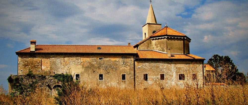 Kompleks pavlinskog samostana i crkve sv. Petra i Pavla